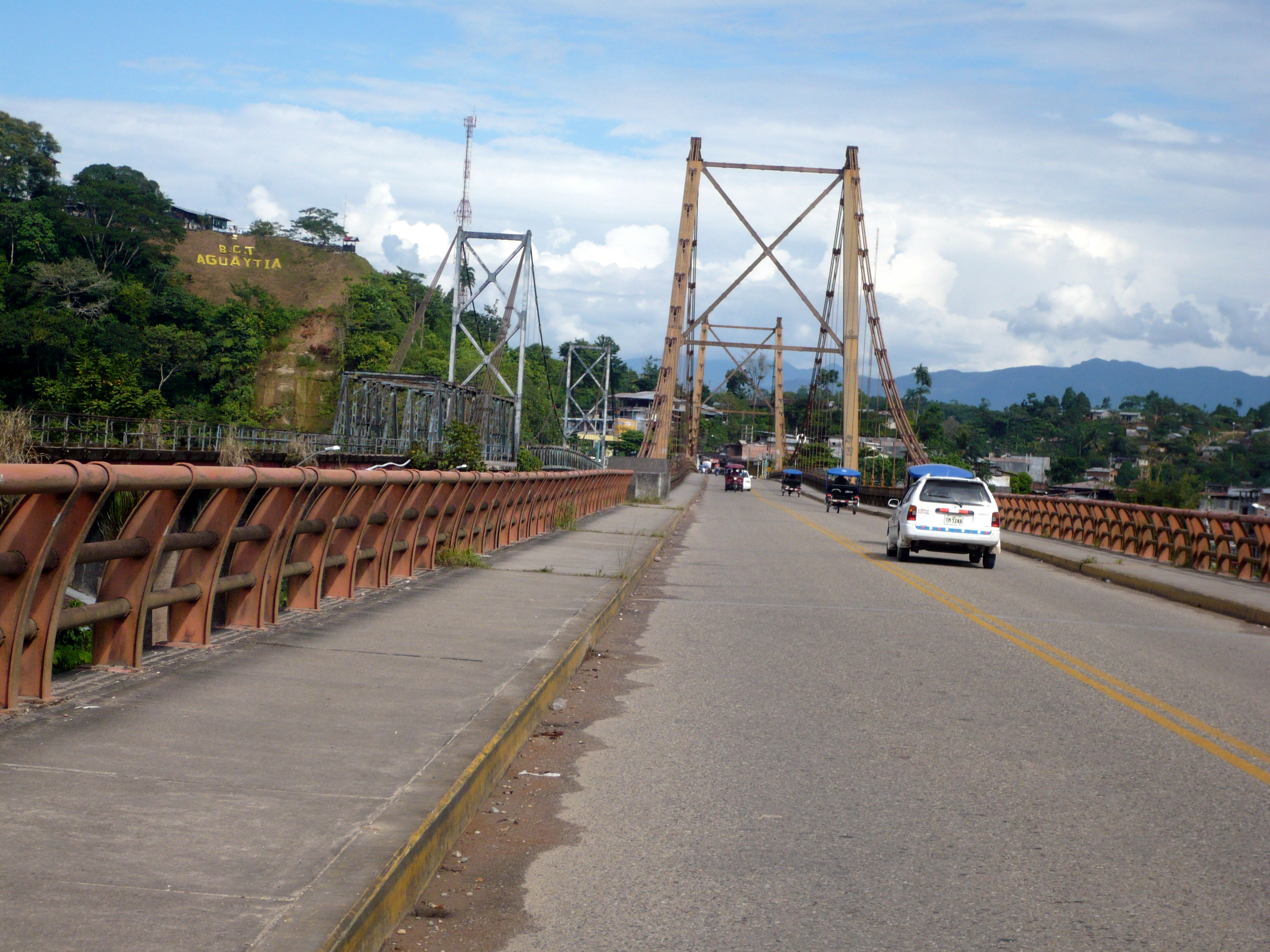 El puente de la ciudad de Aguaytía en la carretera Federico Basadre.